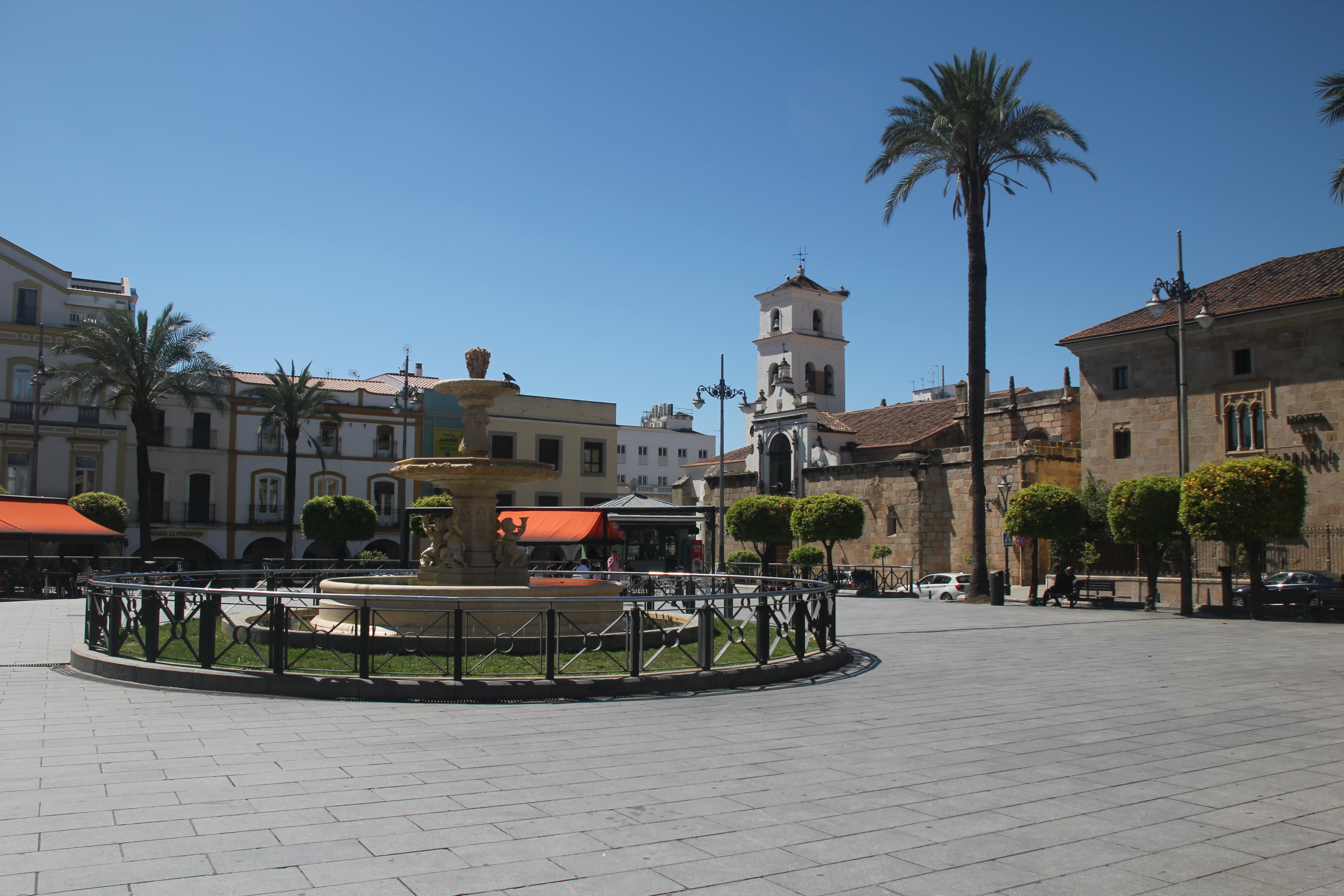 Plaza de España en Mérida.